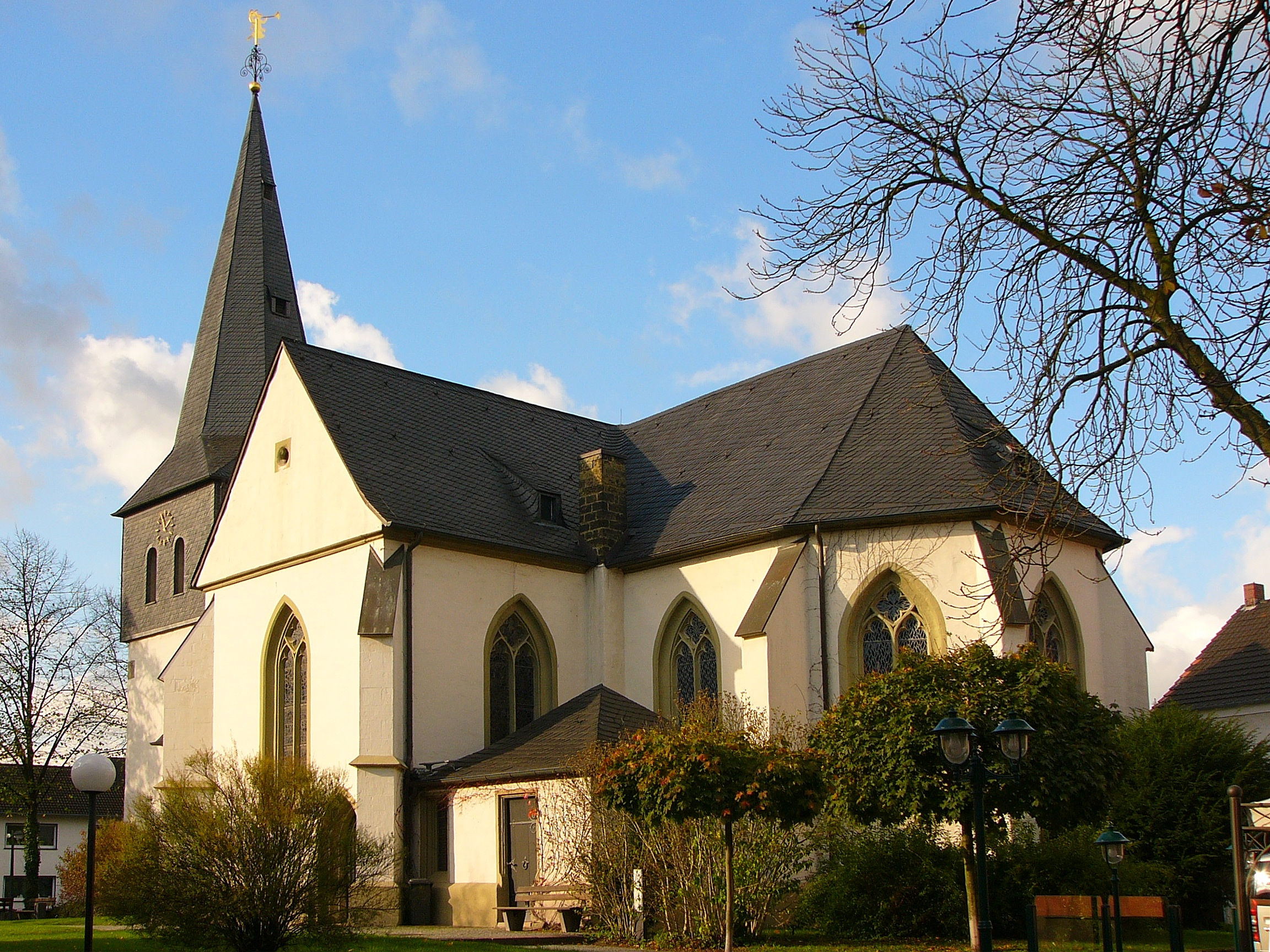 Ev. Pfarrkirche St. Pankratius.This is a photograph of an architectural monument.